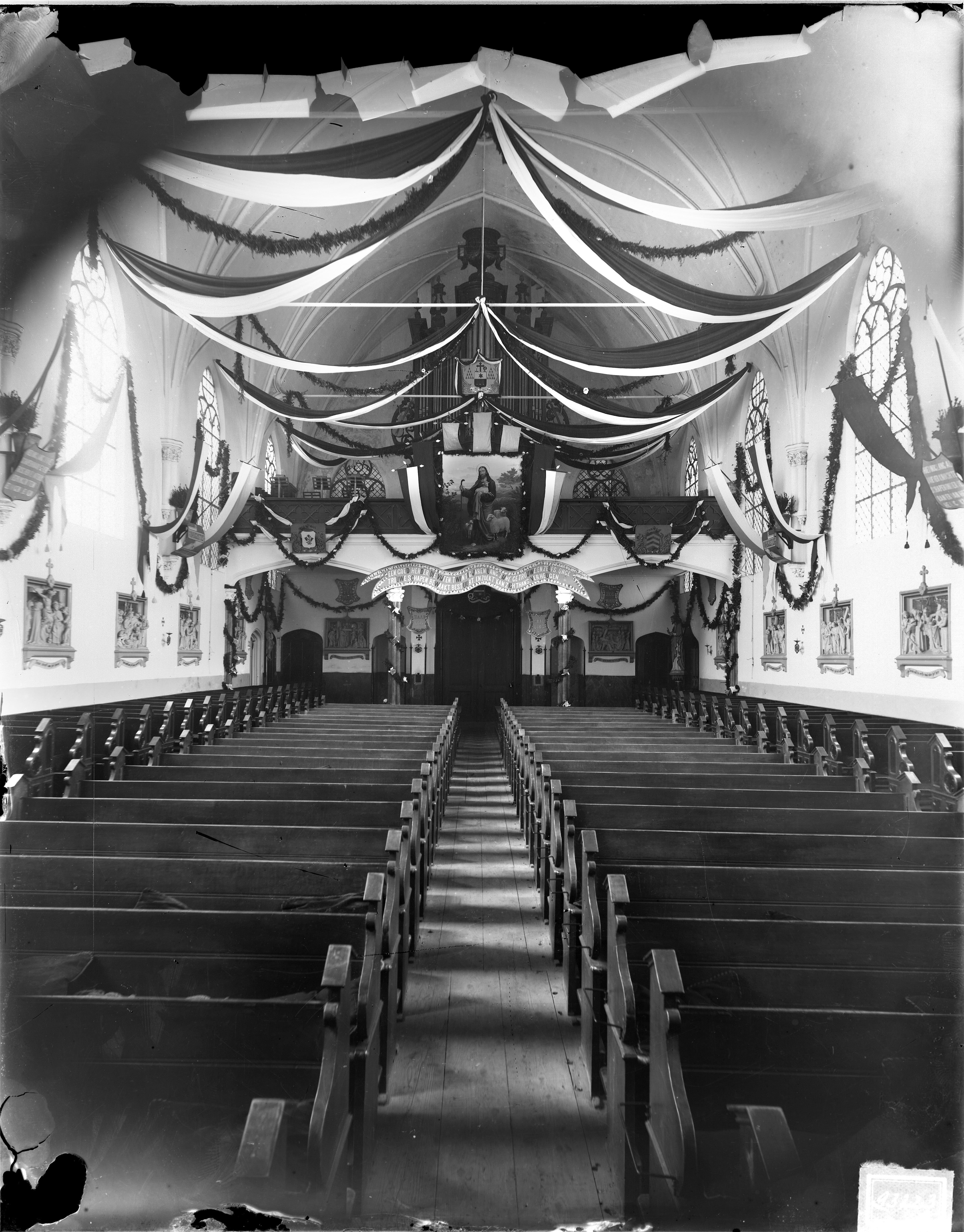 Interieur van de Nicolaaskerk aan de Dorpsstraat in Zoetermeer. Versierd ter gelegenheid van vijfentwintig jarig herderschap van pastoor Petrus Van der Hagen in 1896, die toen 25 jaar pastoor was in de kerk van Zoetermeer . Twee jaar later vierde hij zijn 50-jarig priester.